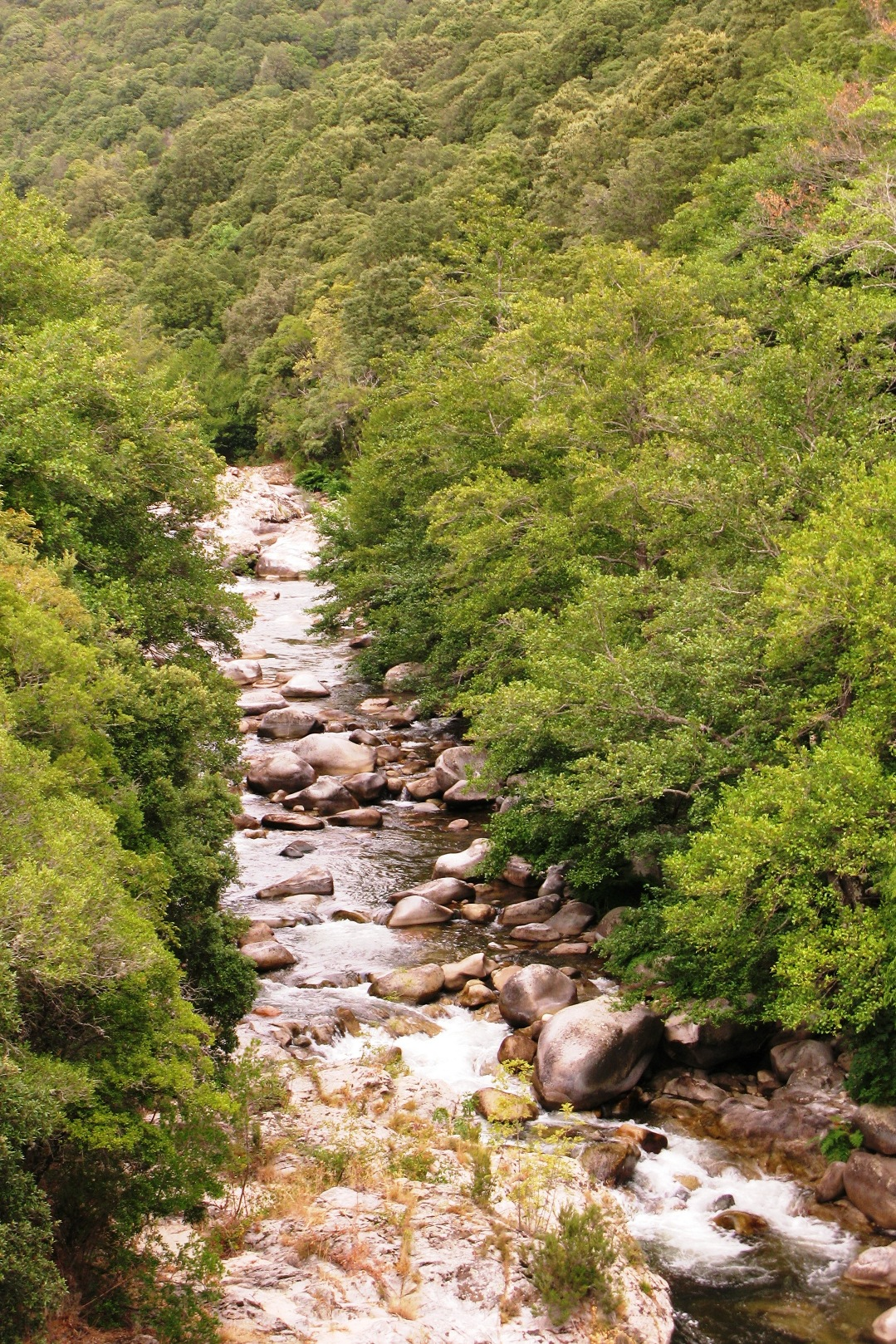 Le Taravo vu du Ponti di Traghjettu Ghjuvani